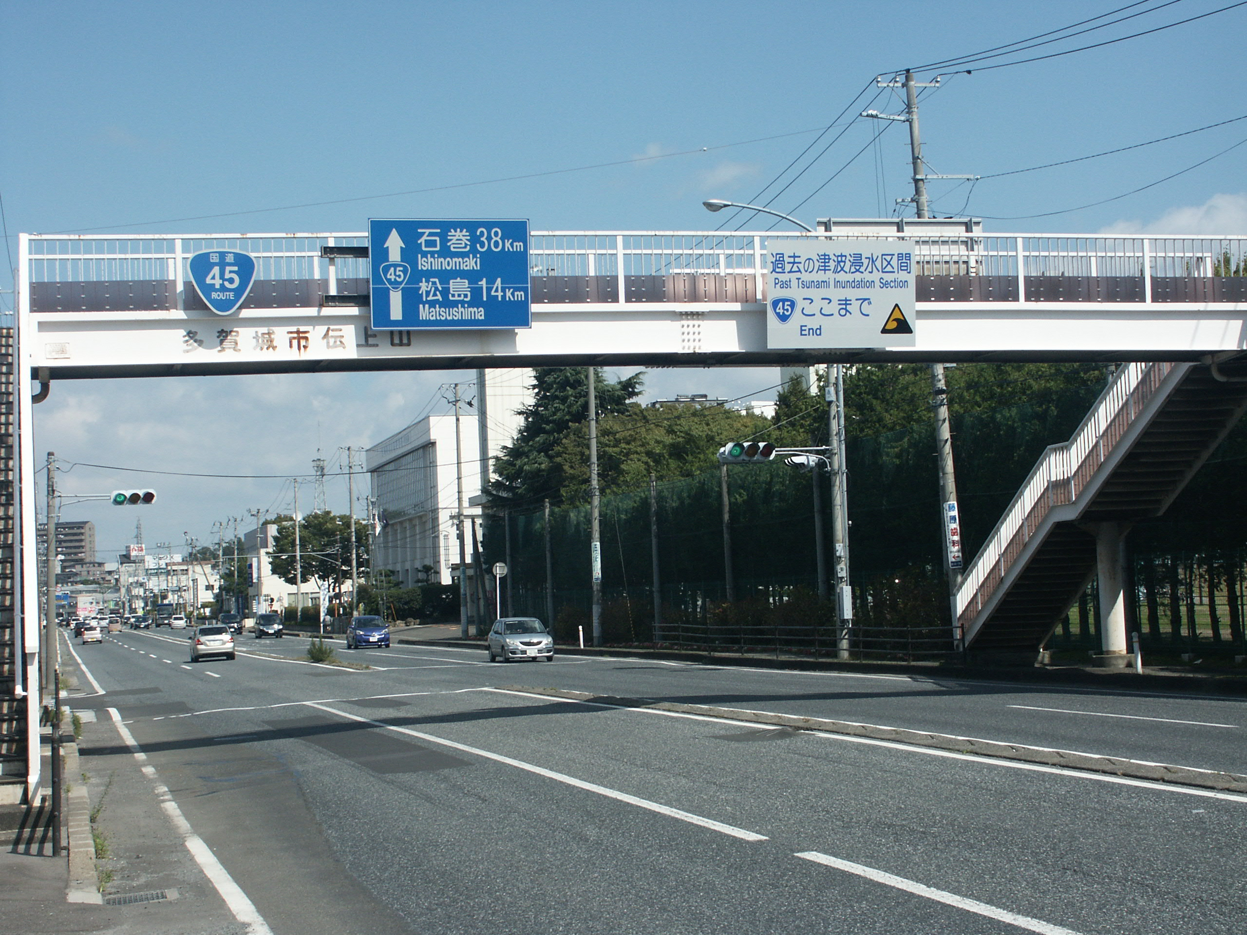 国道45号線宮城県多賀城市伝上山付近（塩釜方面を撮影）